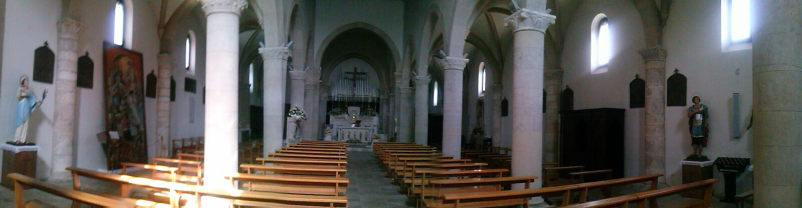 Panoramica interna della chiesa di Santa Lucia